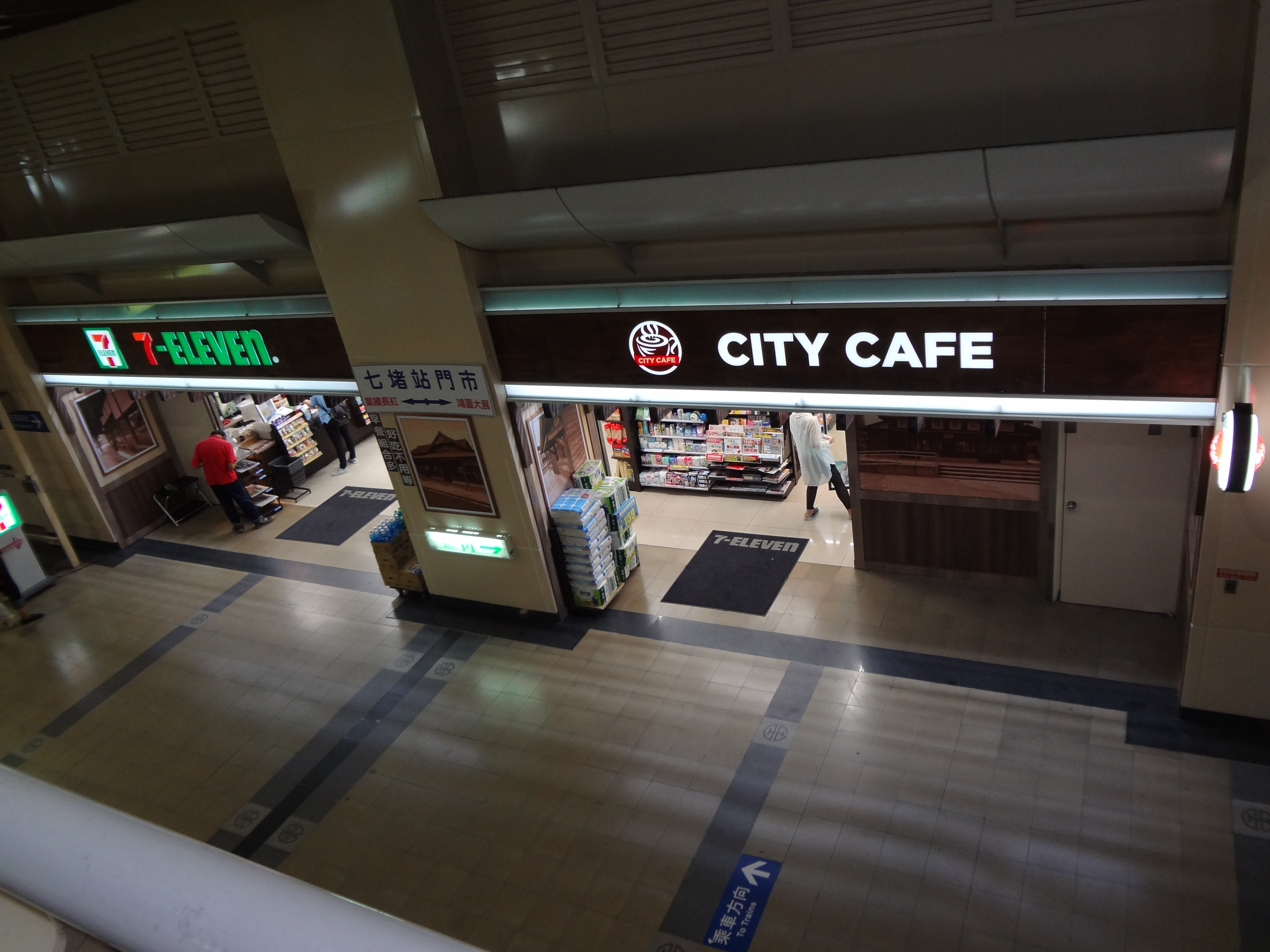 統一超商七堵站門市，位於臺灣鐵路管理局七堵車站1樓，店號154596。